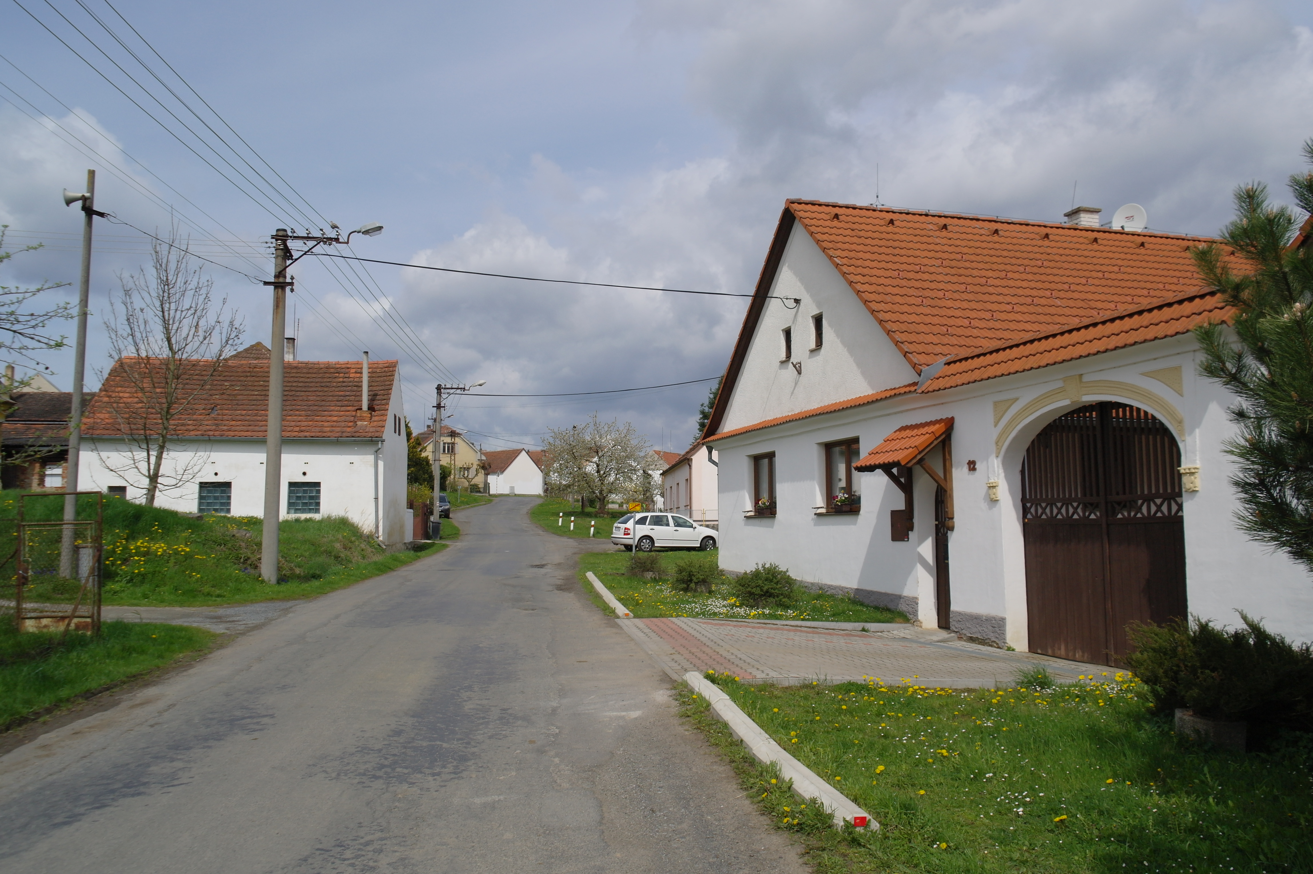 Kucíny